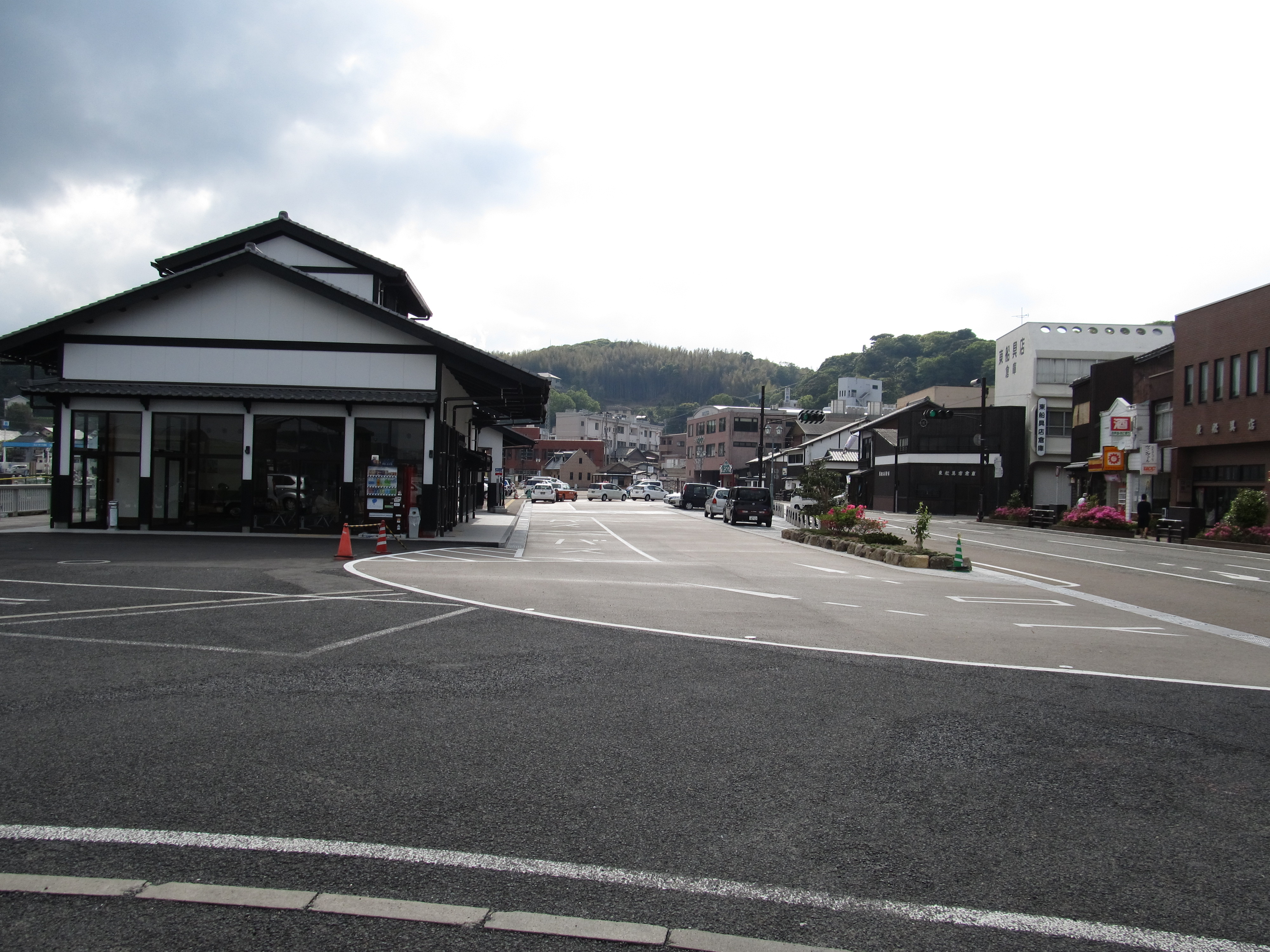 長崎県平戸市にある平戸桟橋バスターミナル。